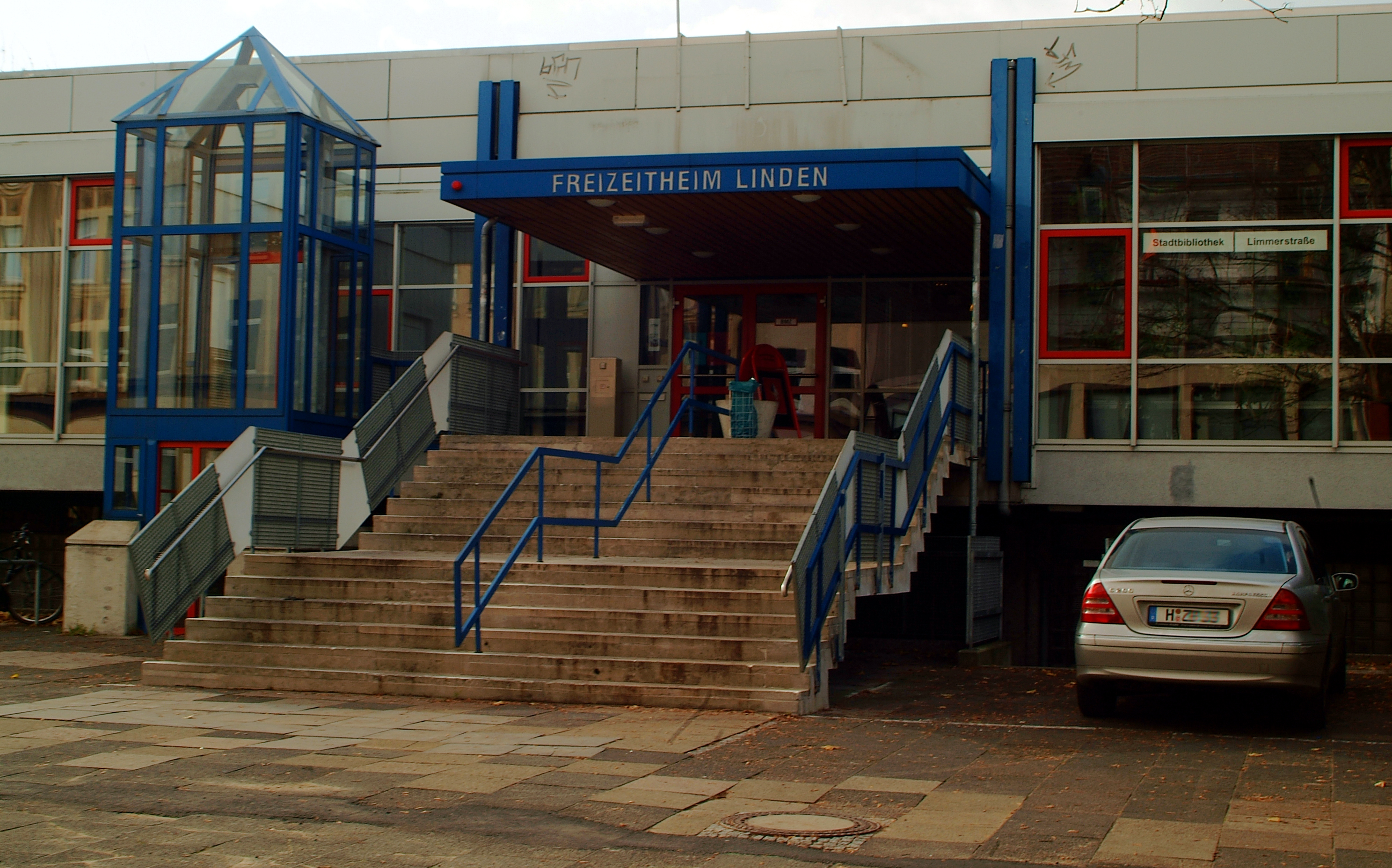 Eingang des Freizeitheimes Linden mit einem Fahrstuhl neben dem Treppenaufgang und der angeschlossenen Stadtteilbücherei Limmerstraße